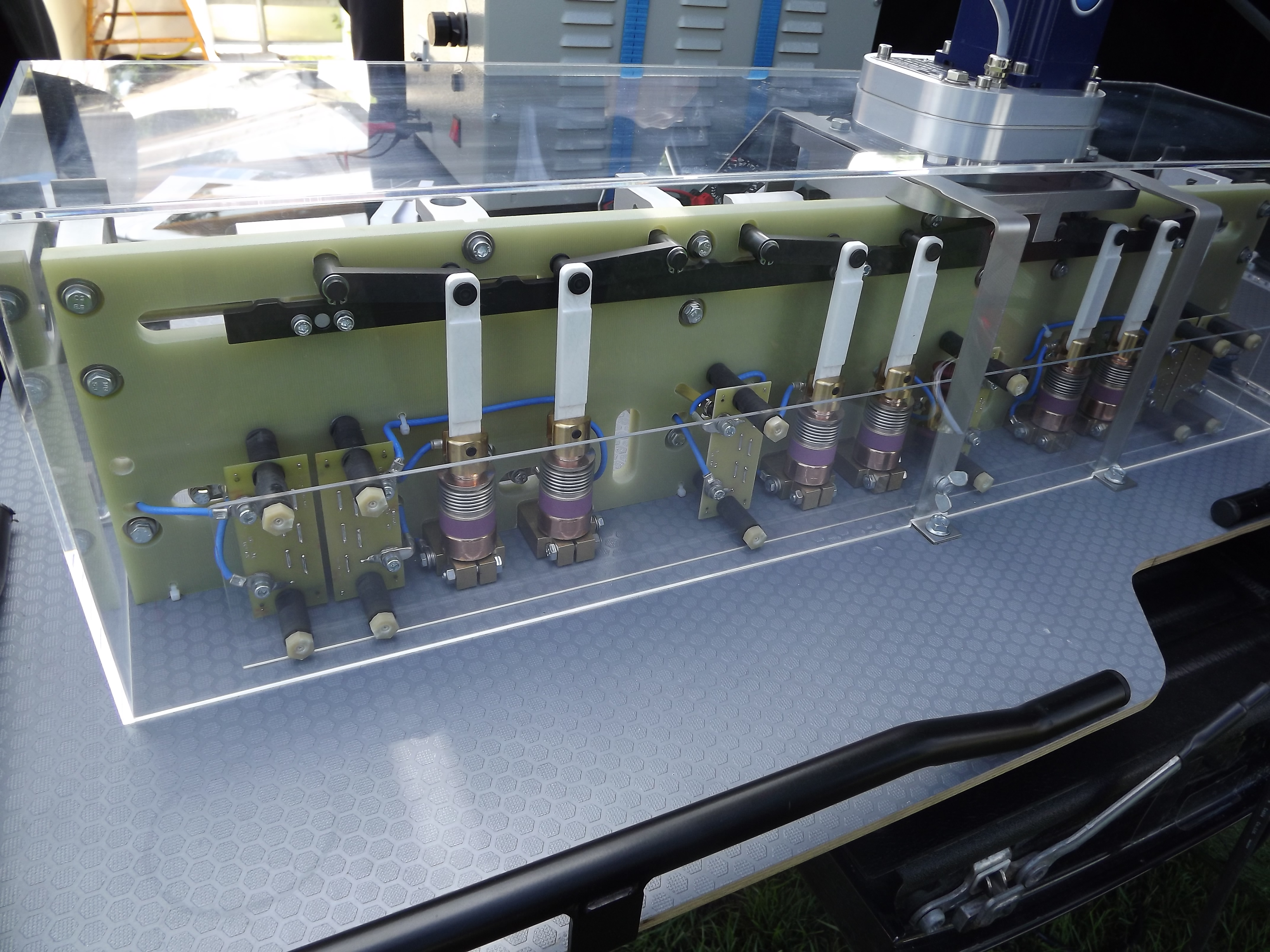 Auf dem Bild ist eine Schaltergruppe zu sehen, die in einem regelbaren Ortsnetztransformator (Ront) verbaut wird, um primärseitig (Hochspannung) zwischen Wicklungsabgriffen umzuschalten. Die violetten Zylinder sind Vakuumschalter, die mechanisch betätigt werden. Mit Ihnen werden die Wicklungsabgriffe vor dem Schaltvorgang spannungsfrei geschaltet. Die Schaltergruppe ist ein Originalbauteil der Maschinenfabrik Reinhausen, das zu Demonstrationszwecken in einem Schaukasten betrieben werden kann.